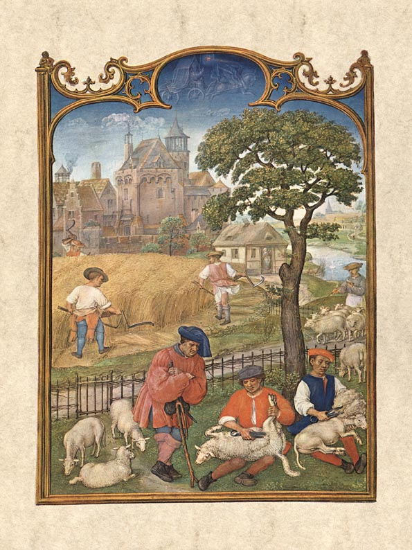 Juli, Brevarium Grimani, fol. 8v (Flemish)